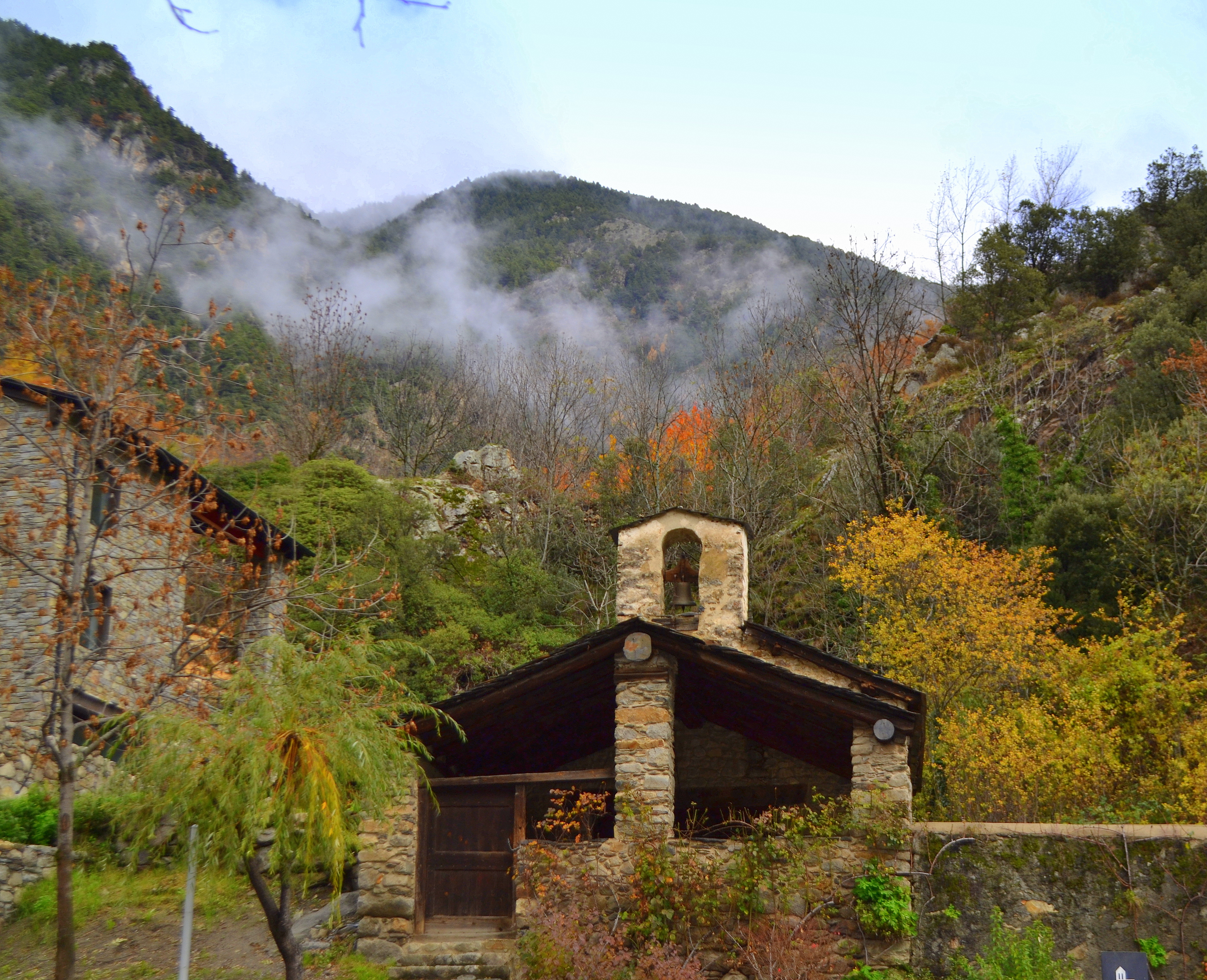 Església de Sant Esteve de Bixessarri